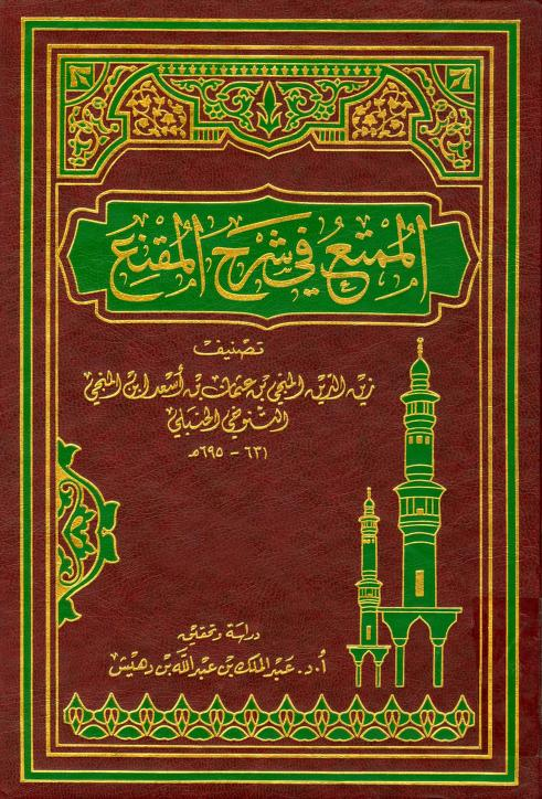 كتاب الممتع في شرح المقنع - كتاب في الفقه الحنبلي